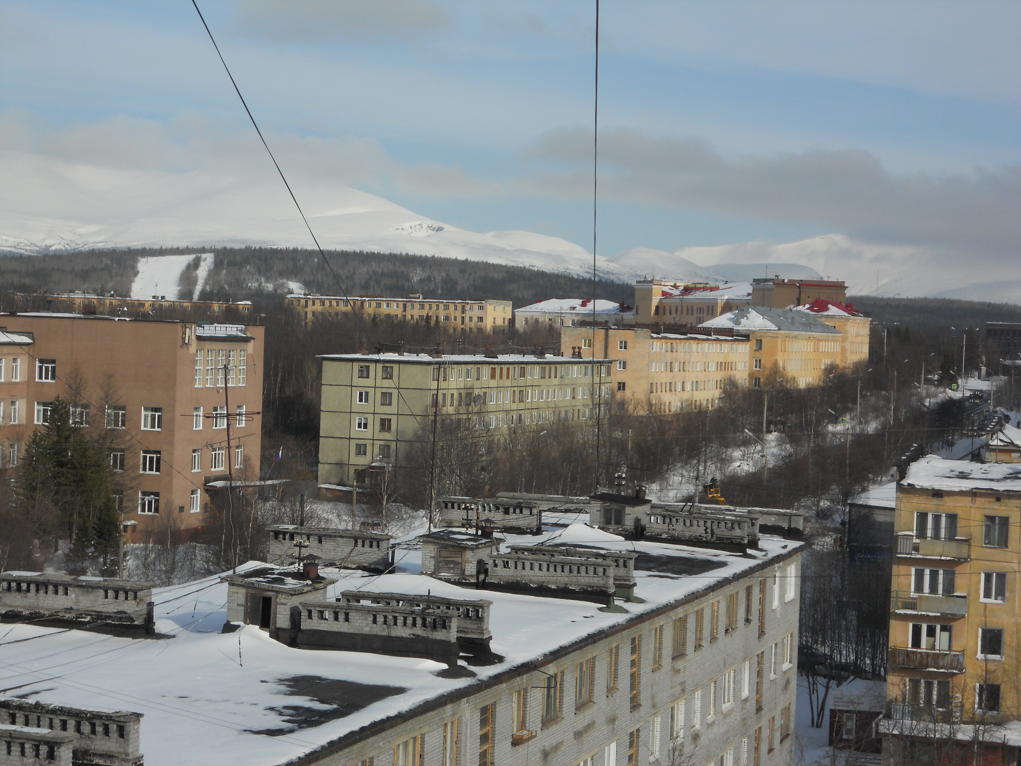 Академгородок